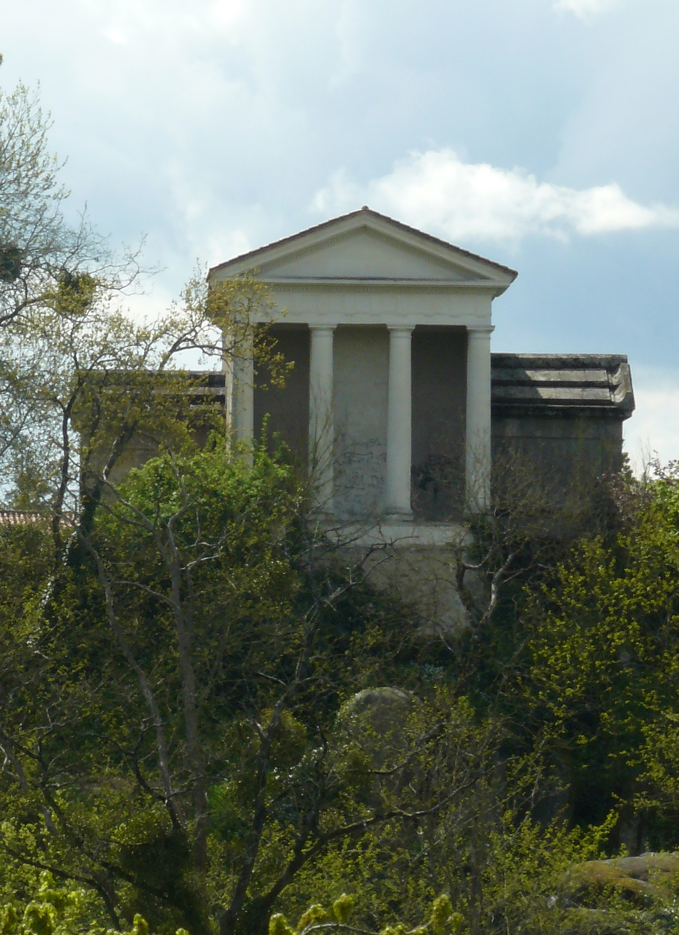 Temple de l'Amitié à Clisson This building is en partie classé, en partie inscrit au titre des Monuments Historiques.